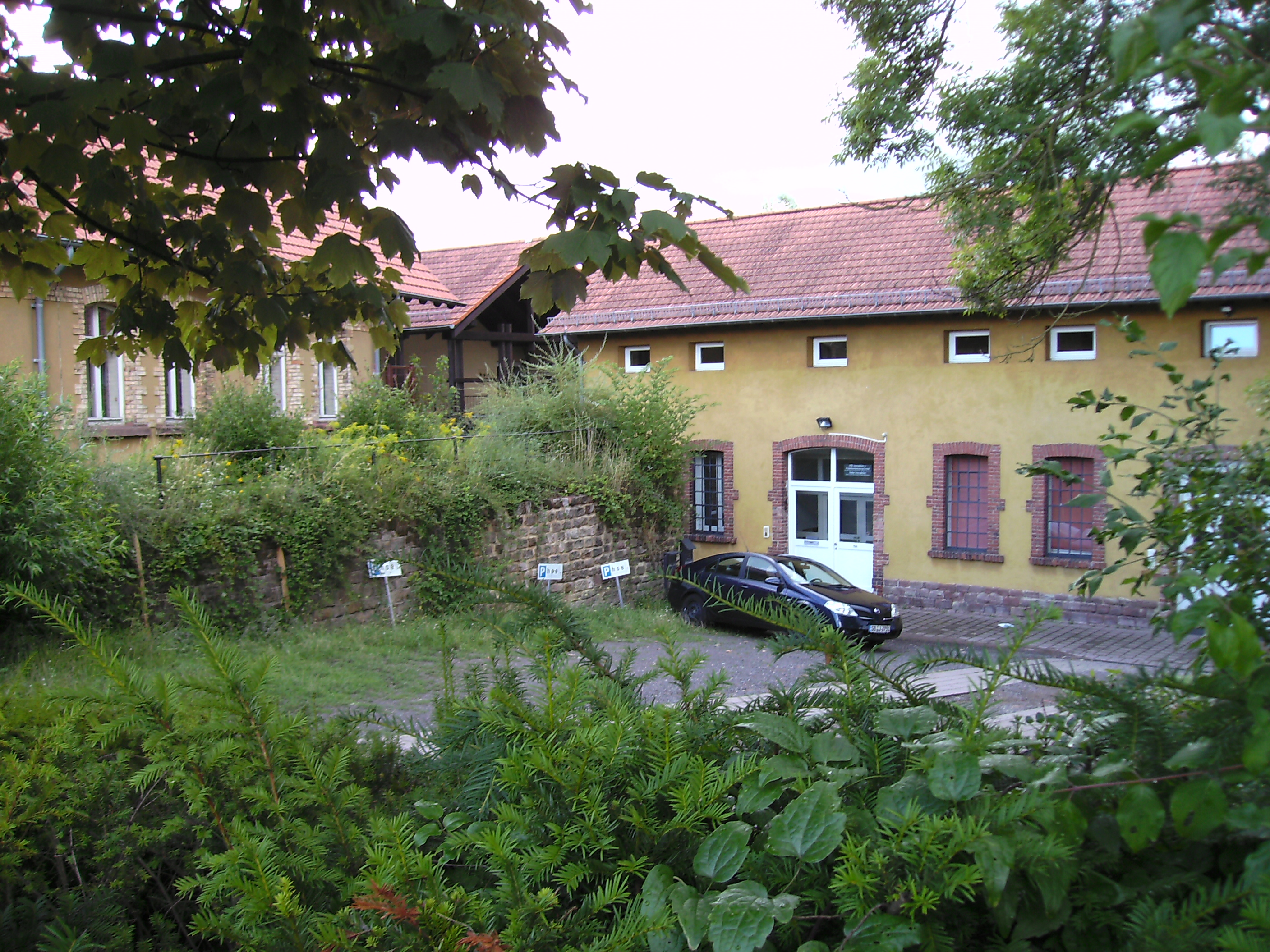 Alte Schmelz St. Ingbert: "Franzosenschule"